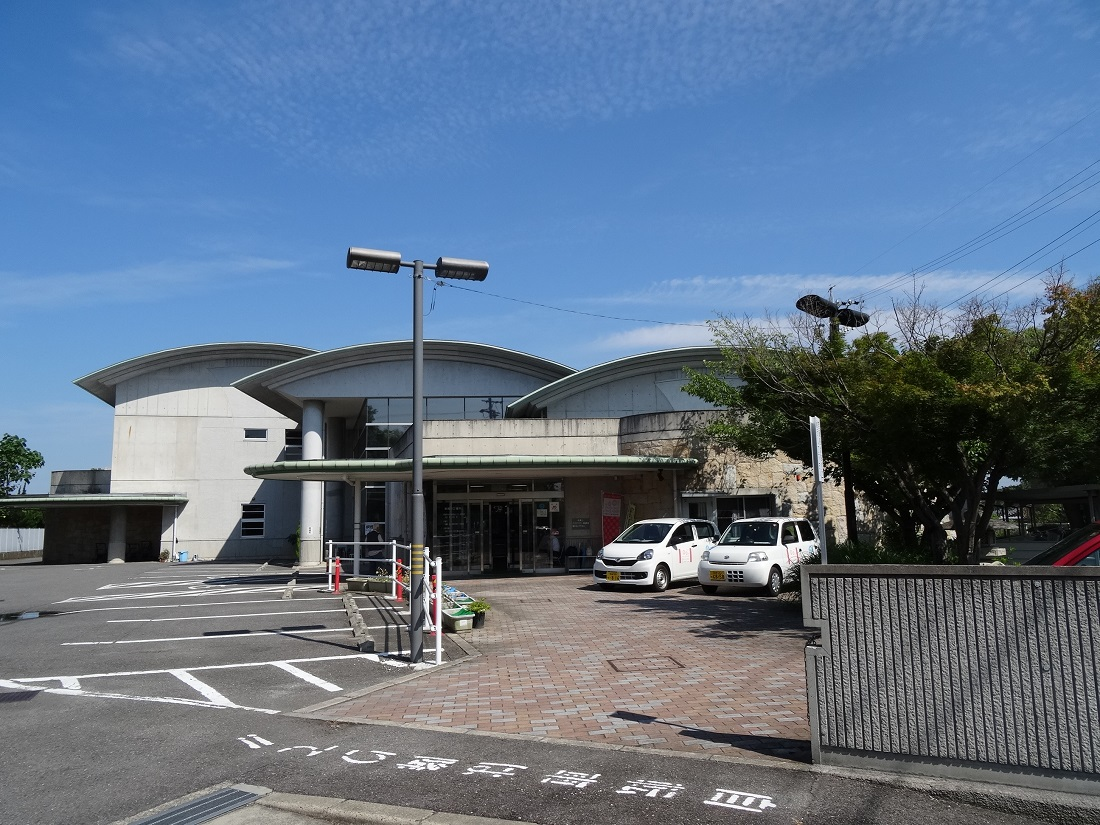 岡崎市中央地域福祉センター（岡崎市梅園町）